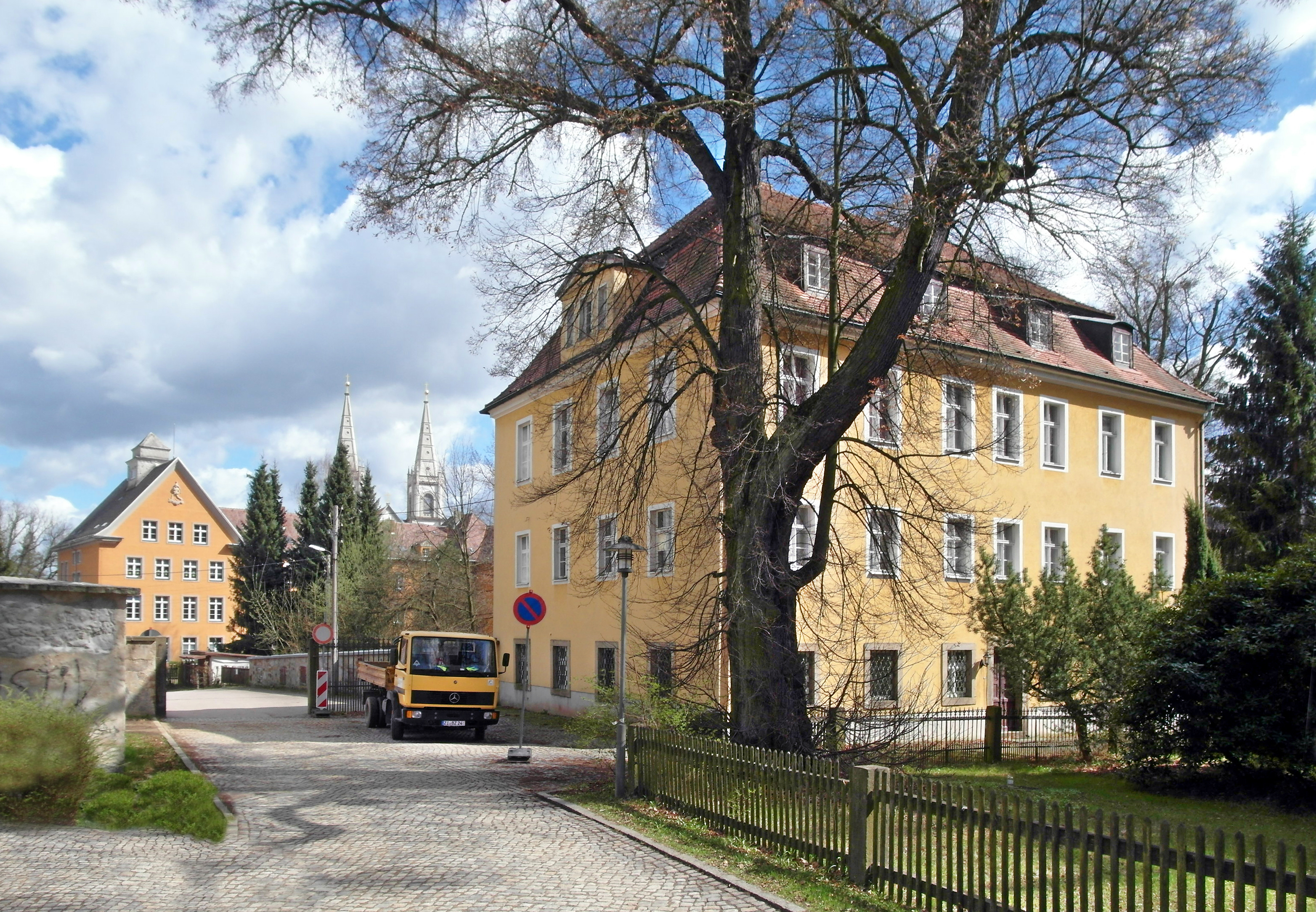 06.04.2017 02681 Schirgiswalde: Am Hof 1. Rittergut Schirgiswalde. Das Herrenhaus, auch als Schloß bezeichnet (GMP: 51.078794,14.429180). Der Oberhof gelangte 1628 an das katholische Domstift St. Petri in Bautzen. 1833 erfolgte unter Domdekan und Bischof Ignaz Bernhard Mauermann ein Umbau seines Sommersitzes. Nach 1922 wurde das Haus als kirchliche Musikschule genutzt. Ab 1970 diente das Schloß als St. Pius-Haus der katholischen Fürsorge für Kinder und Frauen. Zuletzt war im Haus ein Kindergarten, bis dieser in d. sanierte Scheune gegenüber verlegt wurde. Das Schloß soll verkauft werden. Sicht von Nordwesten. [SAM9273.JPG]20170406370DR.JPG(c)Blobelt